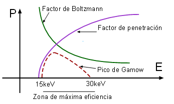 Diagrama de creación propia.